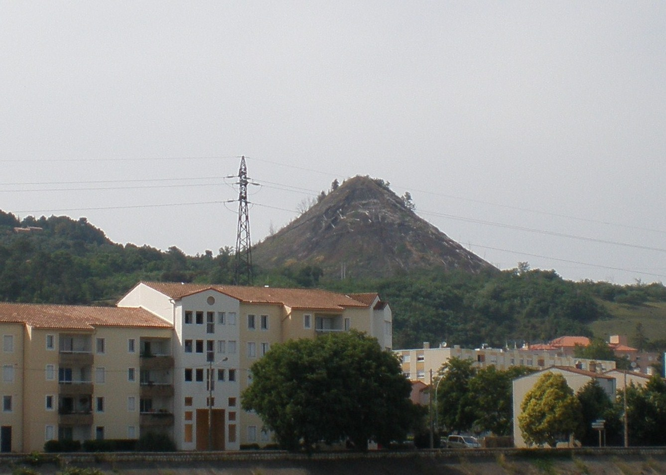 Le "crassier" d'Alès, ancien terril de la mine de Rochebelle (Gard)